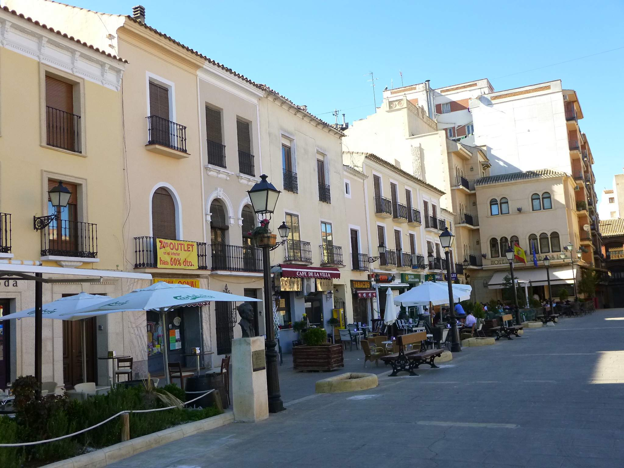 Plaza de Ramón y Cajal (Villarrobledo)